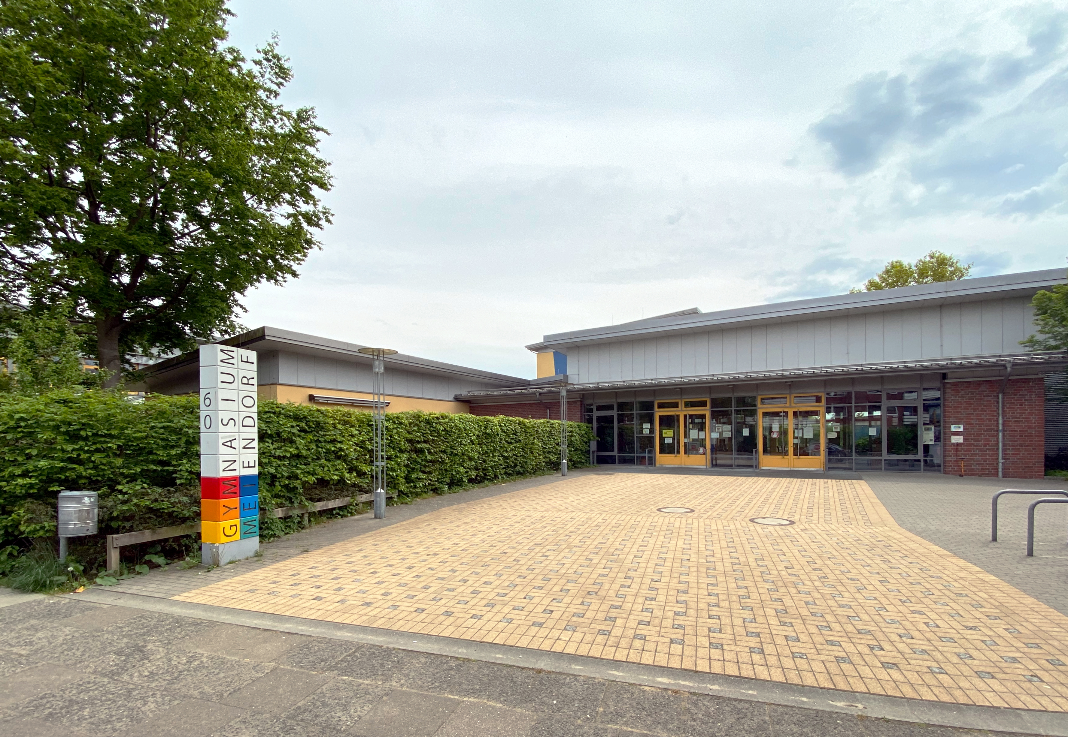 Gymnasium Meiendorf in Hamburg-Rahlstedt, Eingang vom Schierenberg